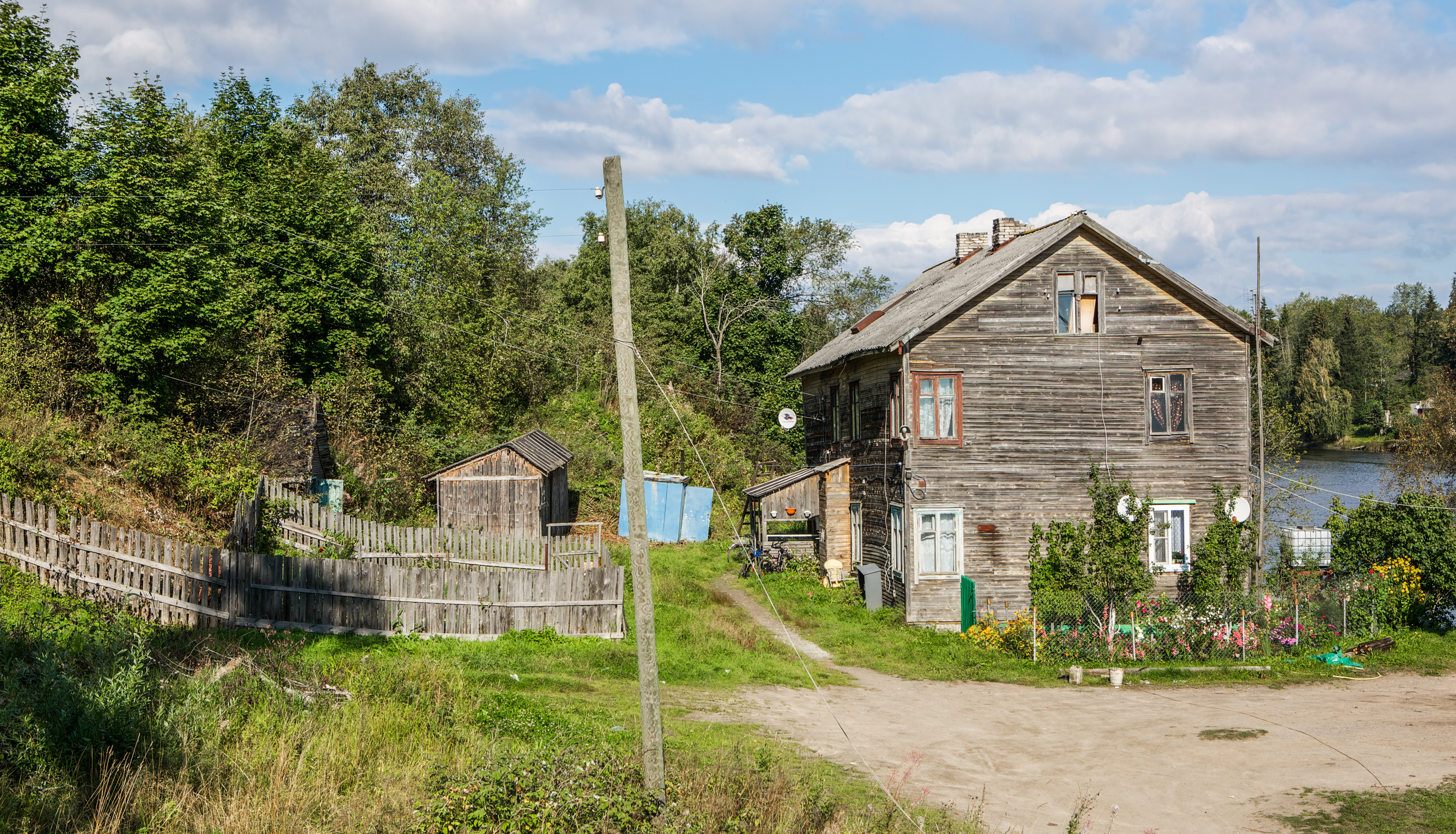 Talo Lesogorskissa Vuoksen rannalla Karjalankannaksella